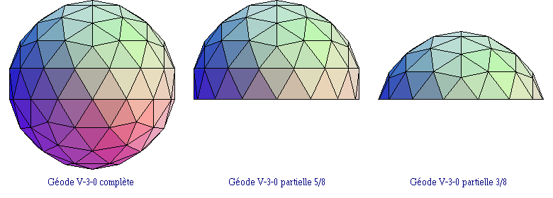 Géodes partielles de paramètres V-3-0